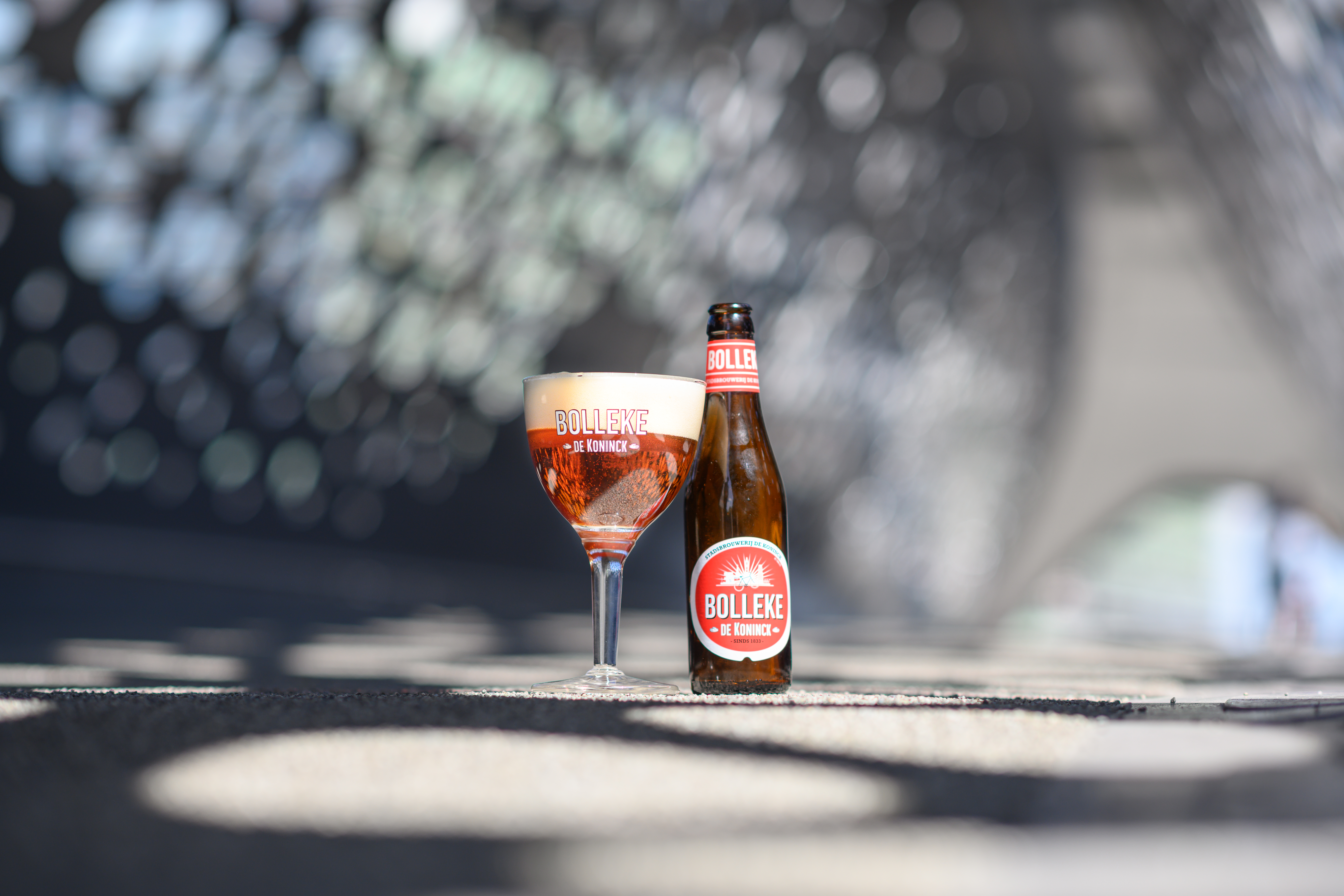 Bolleke in het iconische bollekesglas